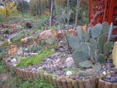 Télálló kaktuszkert, bazaltos, sóderes alapú sziklakert